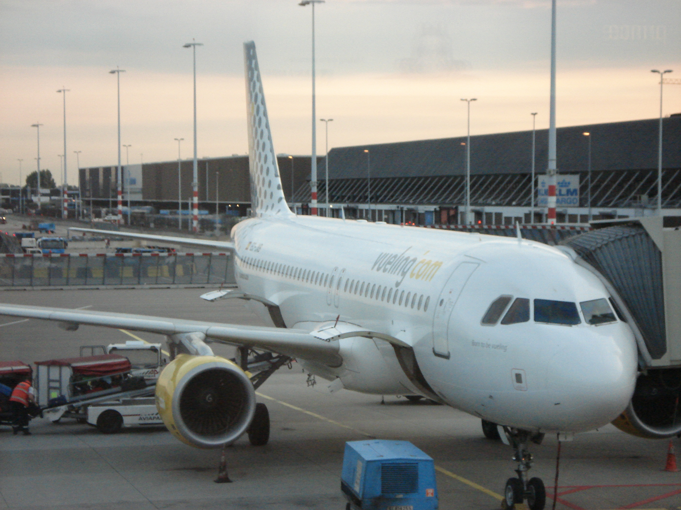 Born to be Vueling en Amsterdam